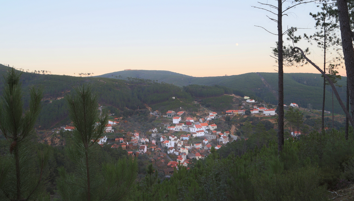 Vista nordeste da aldeia das Fórneas, Freguesia de Sobreira Formosa, Portugal.